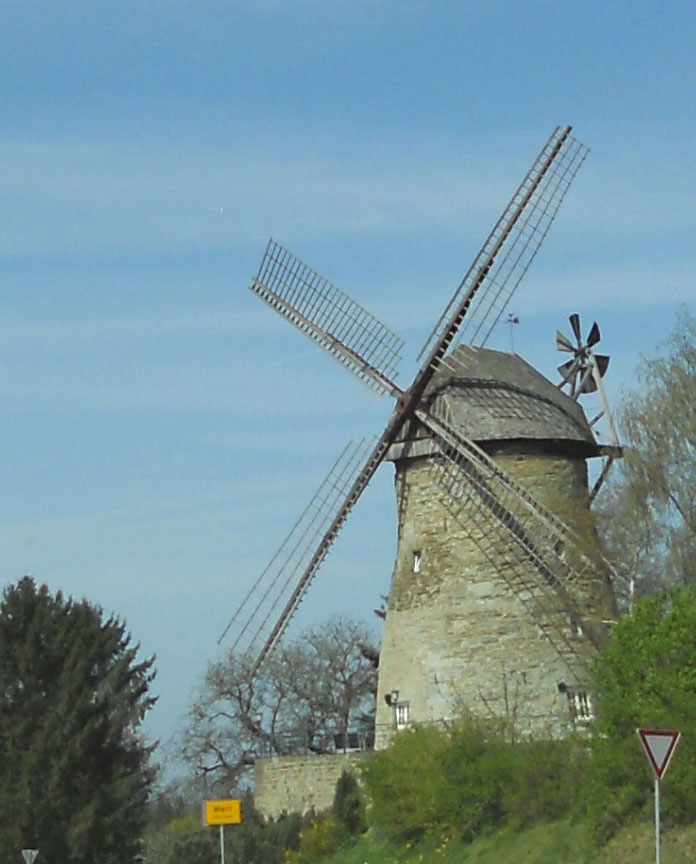 Windmühle in Werl an der Neheimer Straße This image shows a heritage building in Germany, located in the North Rhine-Westphalian city Werl (no. A 181).